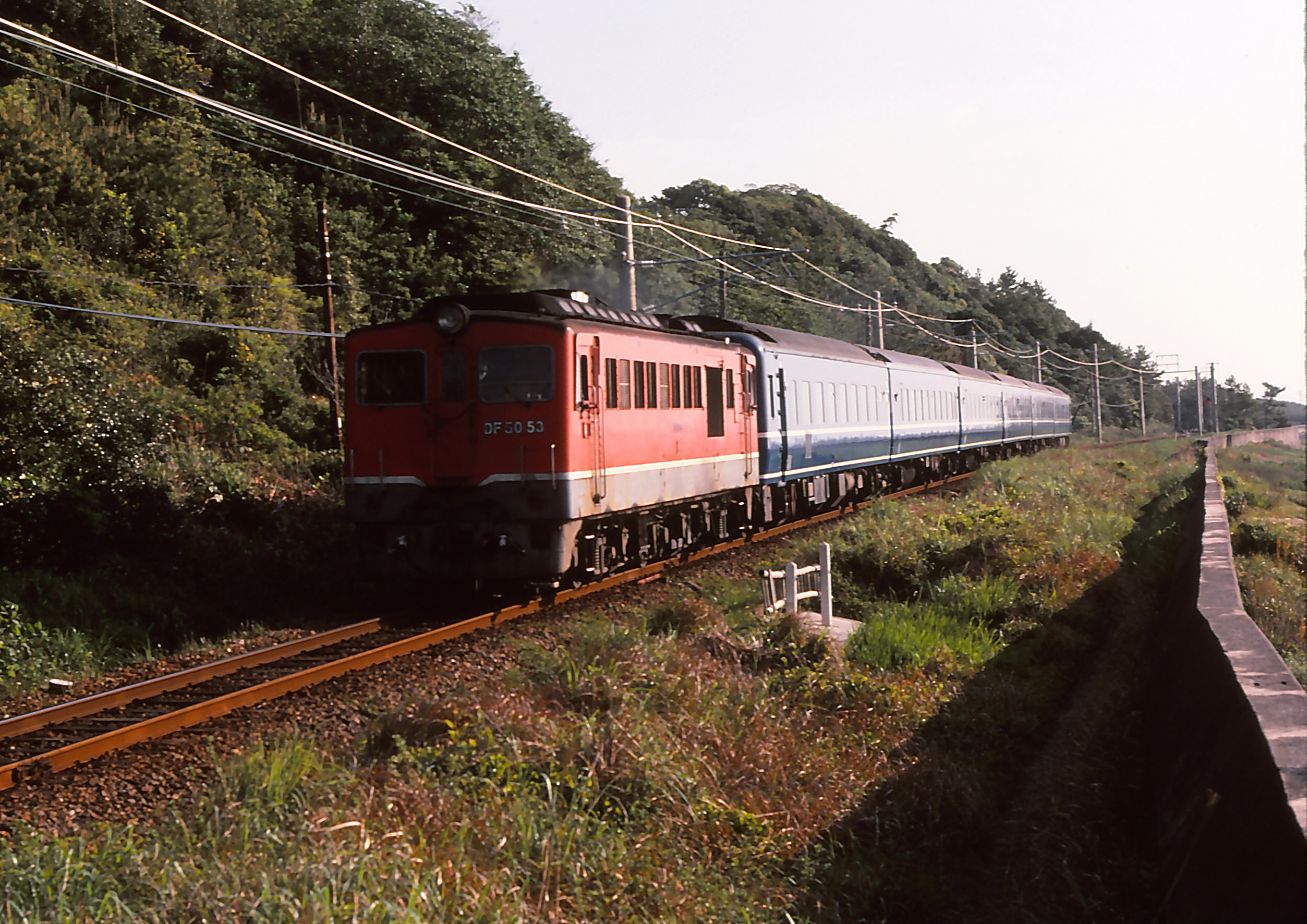 寝台特急 紀伊 ＤＦ50牽引 東京2040－紀伊勝浦718 紀伊勝浦1925-東京625 和歌山県新宮市